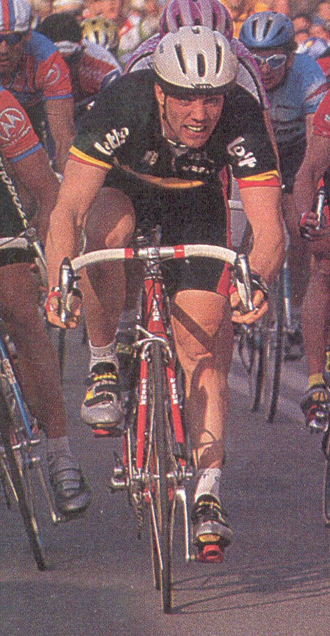 Wilfried Nelissen (3e in de 1e etappe van de Ruta del Sol 1995)